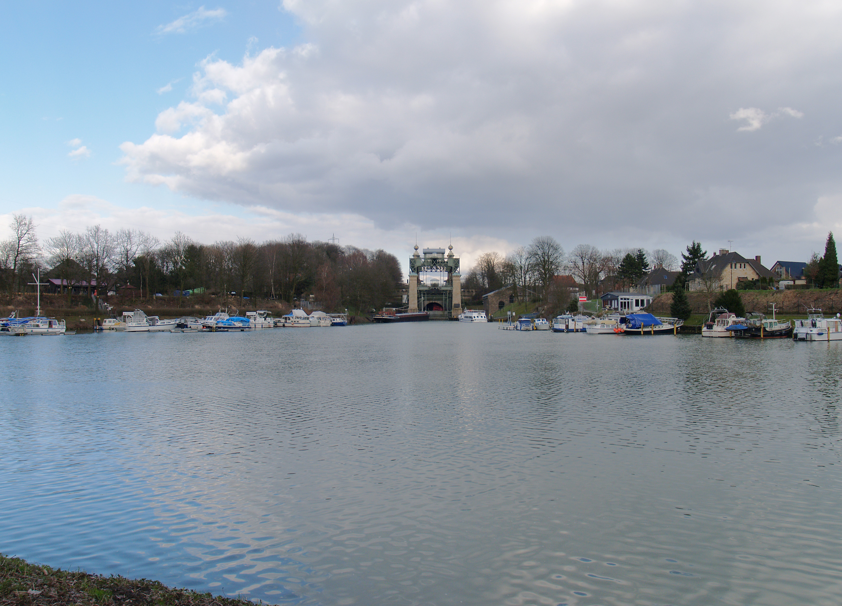 The lower port of the boat lift at Henrichenburg/Waltrop Germany, the connection point of Rhein-Herne-Kanal and Dortmund-Ems-Kanal